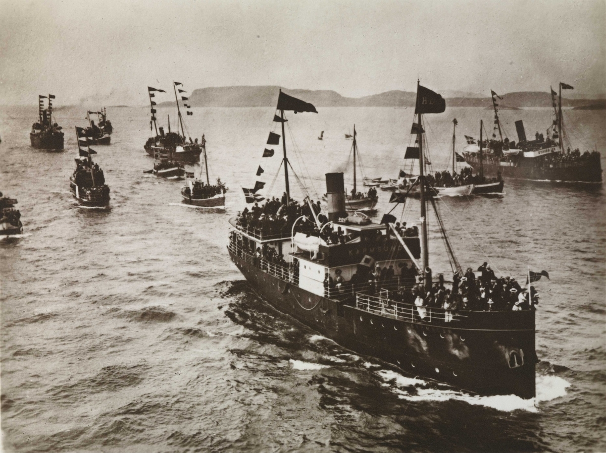 Levert fra Trondhjems Mek. Værksted, Trondheim (byggenr. 113) som lokalruteskip «Karmsund» til Haugesund Dampskibsselskab i 1904.